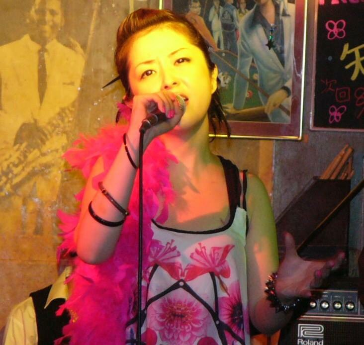 プロフィール写真